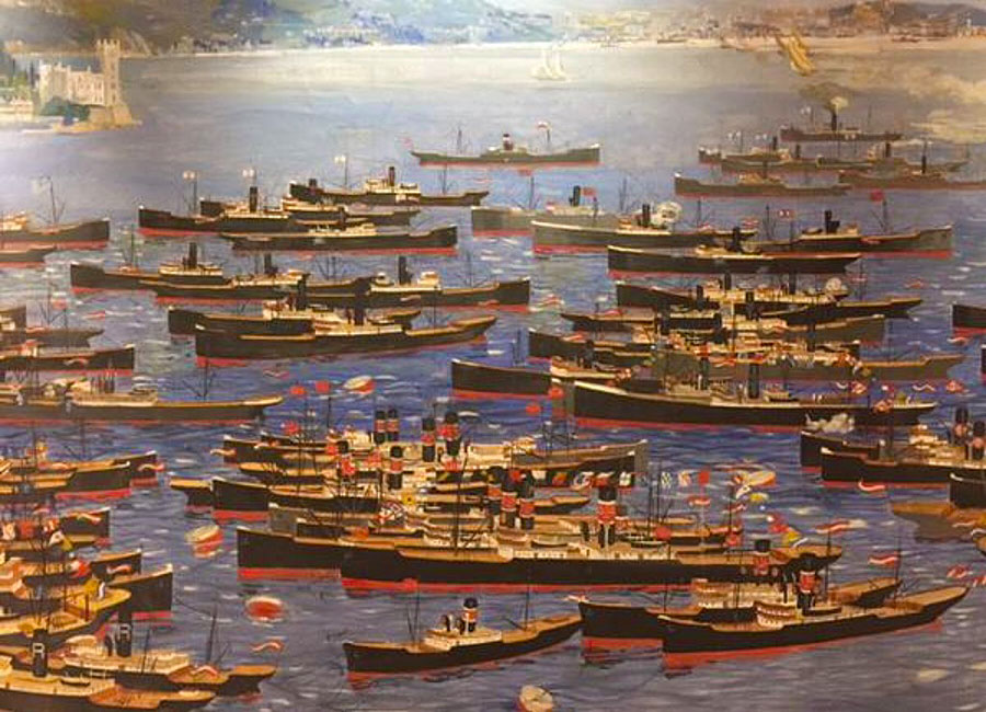 Vito Timmel porto di Trieste